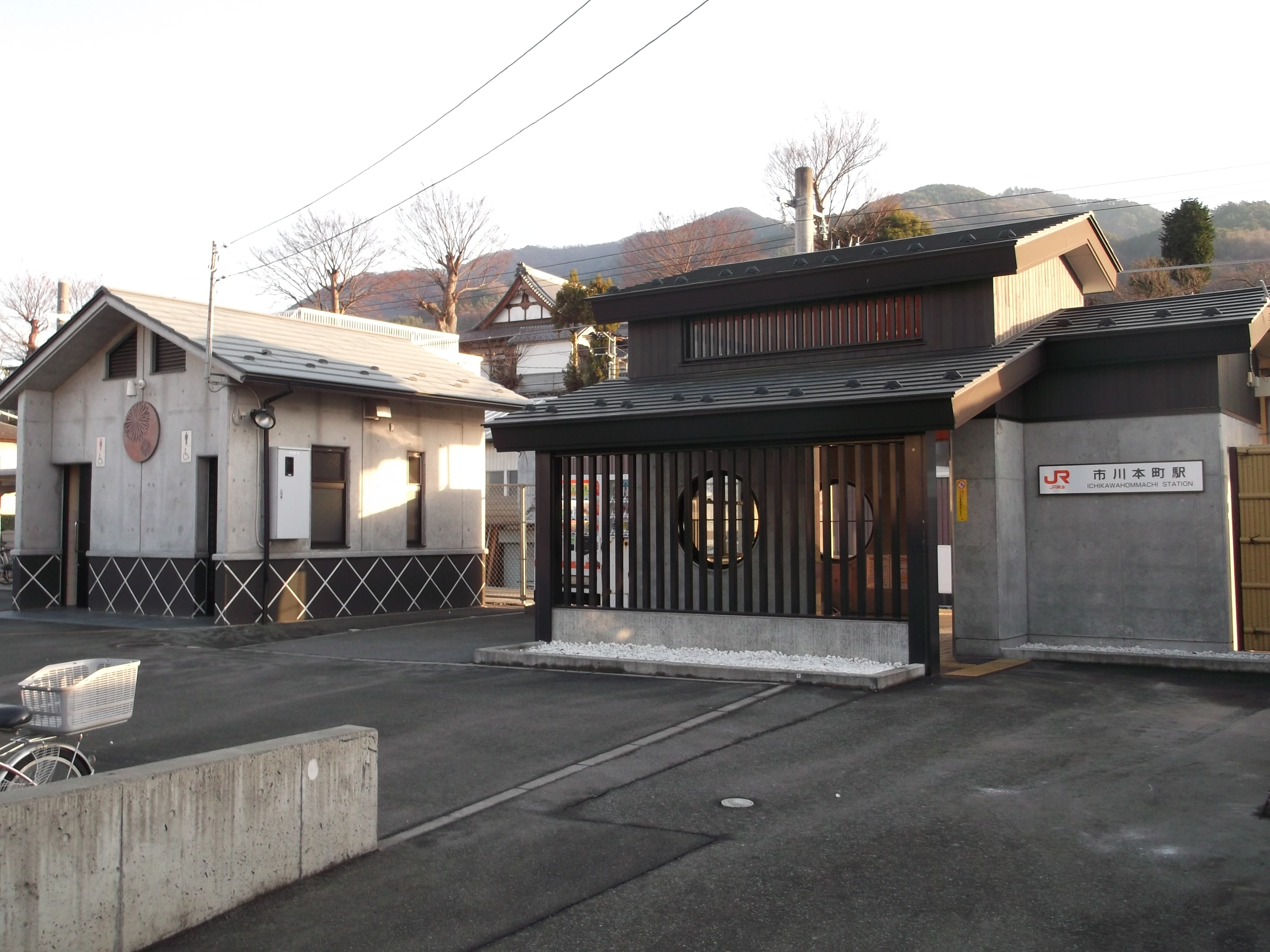 JR身延線市川本町駅 簡易駅舎